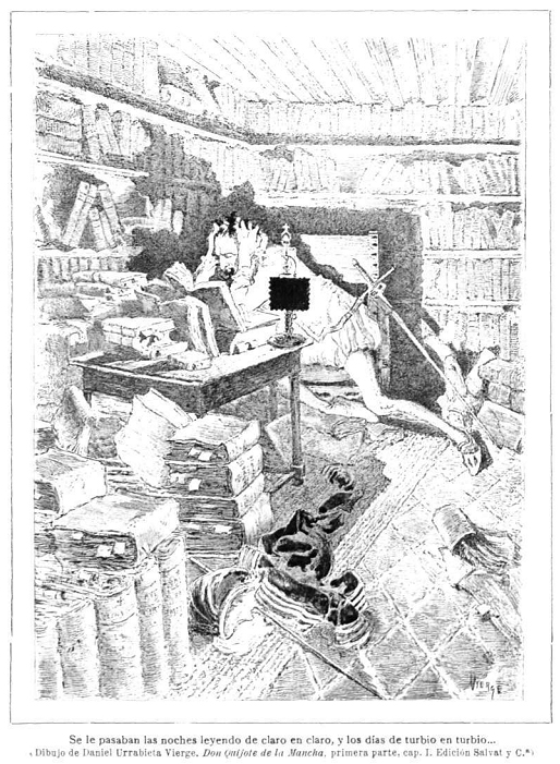 Ilustración para Don Quijote de la Mancha de Daniel Urrabieta Vierge, en la revista Hojas selectas.